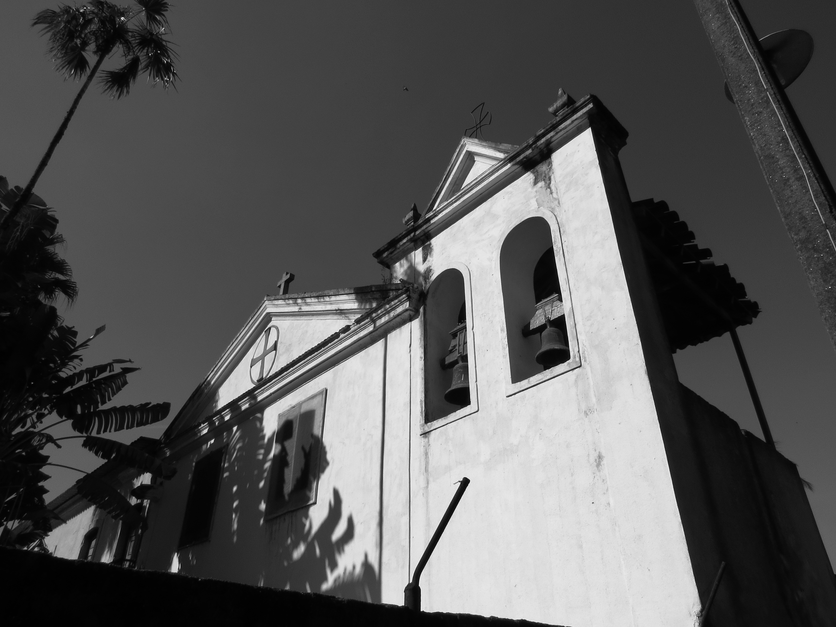 Capela da Fazenda São Bento